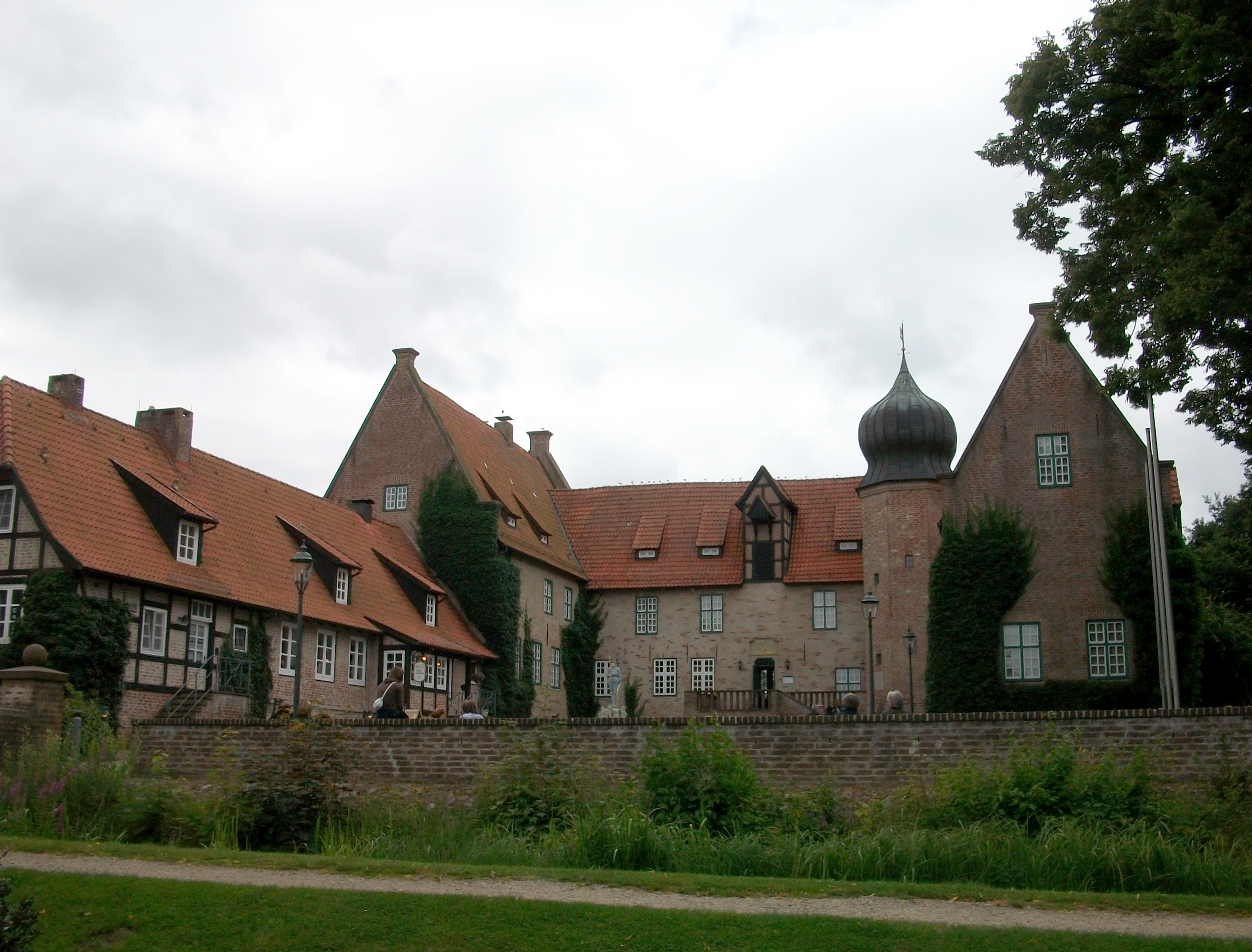 Burg Bederkesa in Bad Bederkesa (Germany)